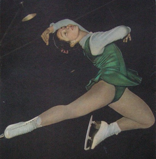 ирина люлякова